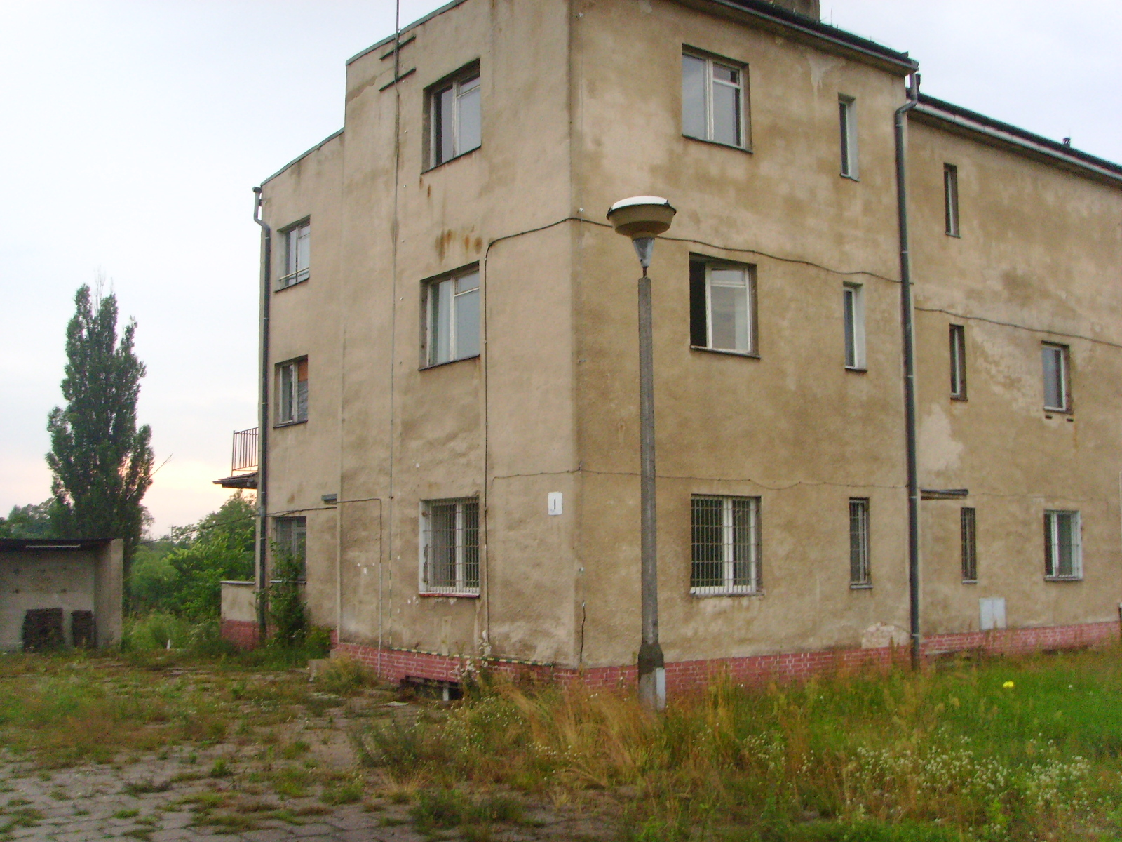 Byla strażnica WOP w Gubinie